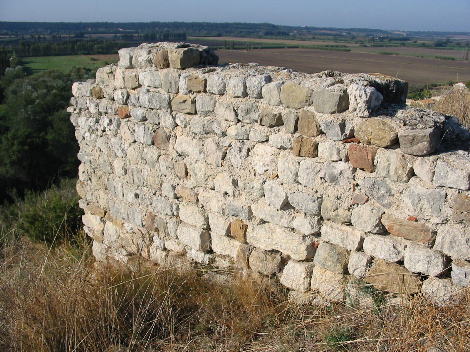 Morceau du rempart sud du site des Tours de Castillon (Paradou, Bouches-du-Rhône).